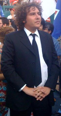 Iván Eduardo Guerrero Mena (n. el 8 de abril de 1975) es un periodista chileno. Es conocido por ser notero del programa CQC.